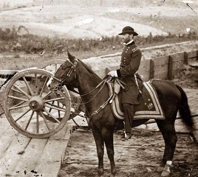 William Tecumseh Scherman à cheval, à Federal Fort 7, lors de la campagne d'Atlanta.